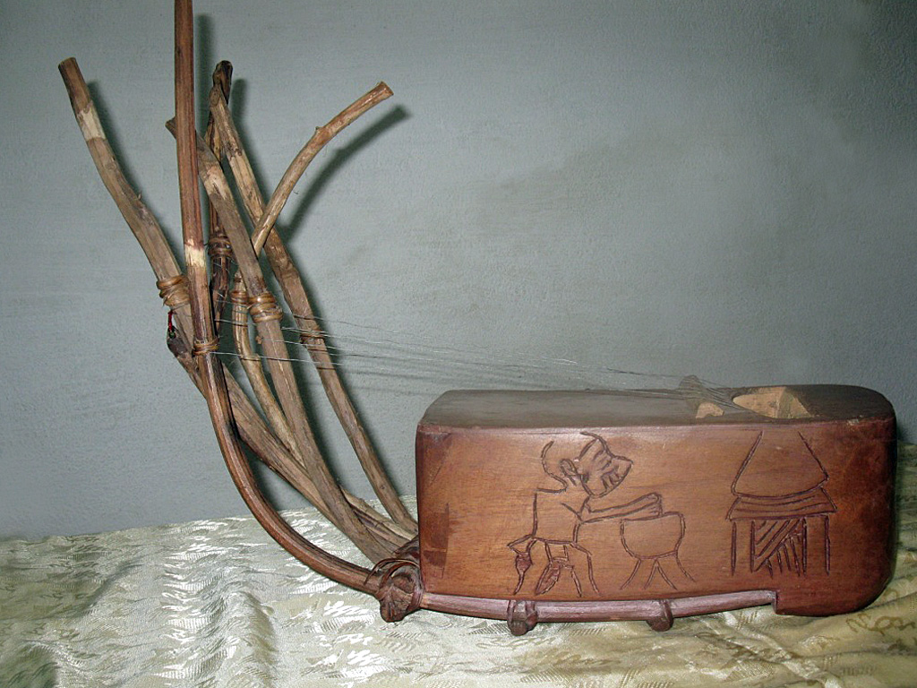 Le hiloung bassa'a est l'ancêtre de la guitare doté de pouvoir.